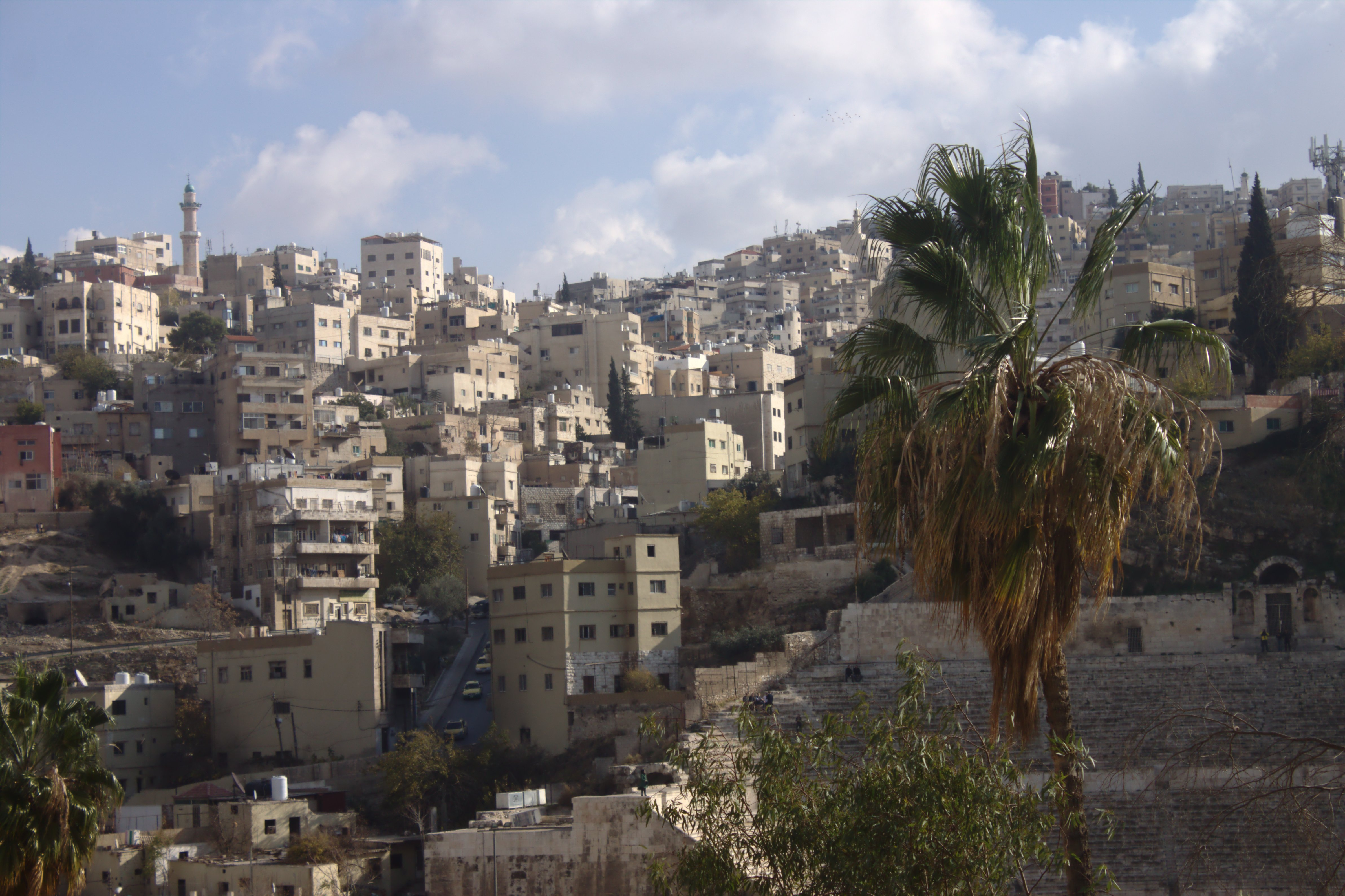 Pohled na město Ammán, Jordánsko